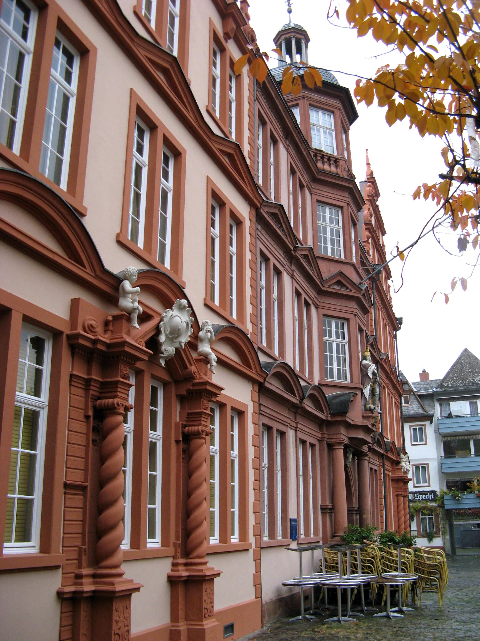 Gutenbergmuseum in Mainz - Haus zum römischen Kaiser; innen das Restaurant Cuvee 2016, welches an das 200 jährige Bestehen von Rheinhessen erinnert.